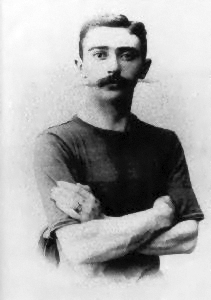 Pierre de Coubertin, Moderniųjų Olimpinių Žaidynių įkūrėjas ir Olimpinių žiedų simbolio autorius Šaltinis: Bild:Pierre Frédy Baron de Coubertin.png